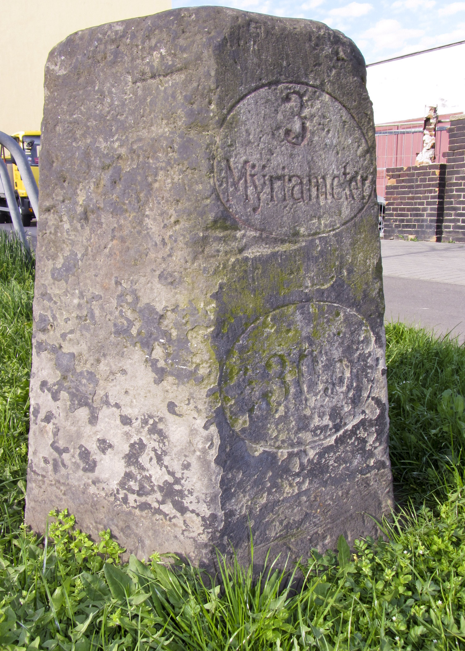 Myriameterstein in Bitterfeld